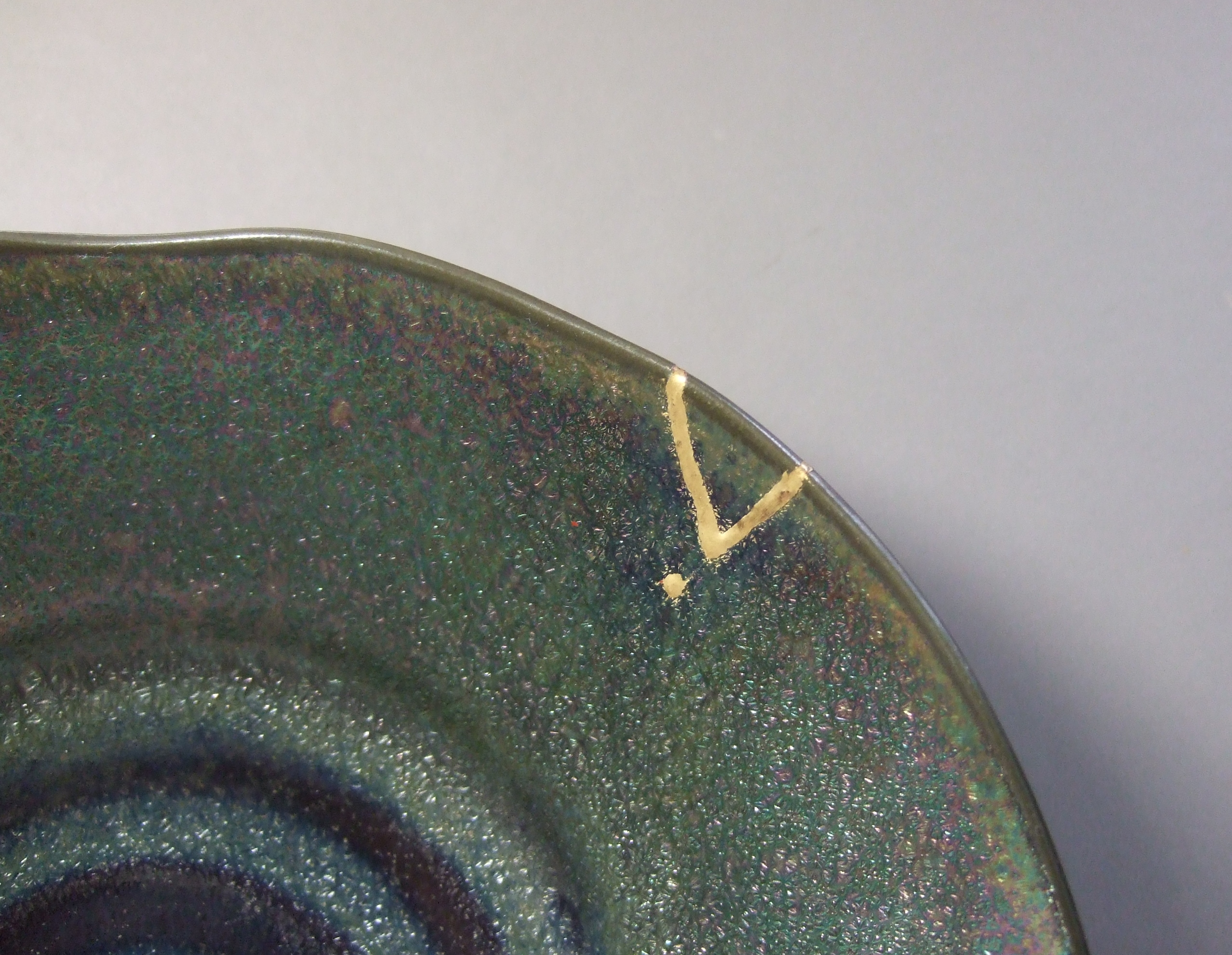 金継ぎで欠けを直し、１年使ったもの。